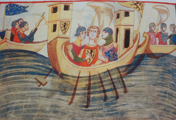 Battle of Zierikzee